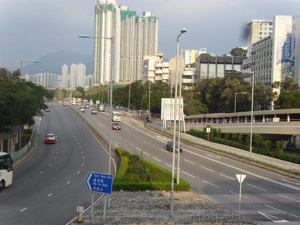 中文（香港）: 沙田車公廟路，八爪魚天橋以東北一段，左方為大圍站公共交通交匯處